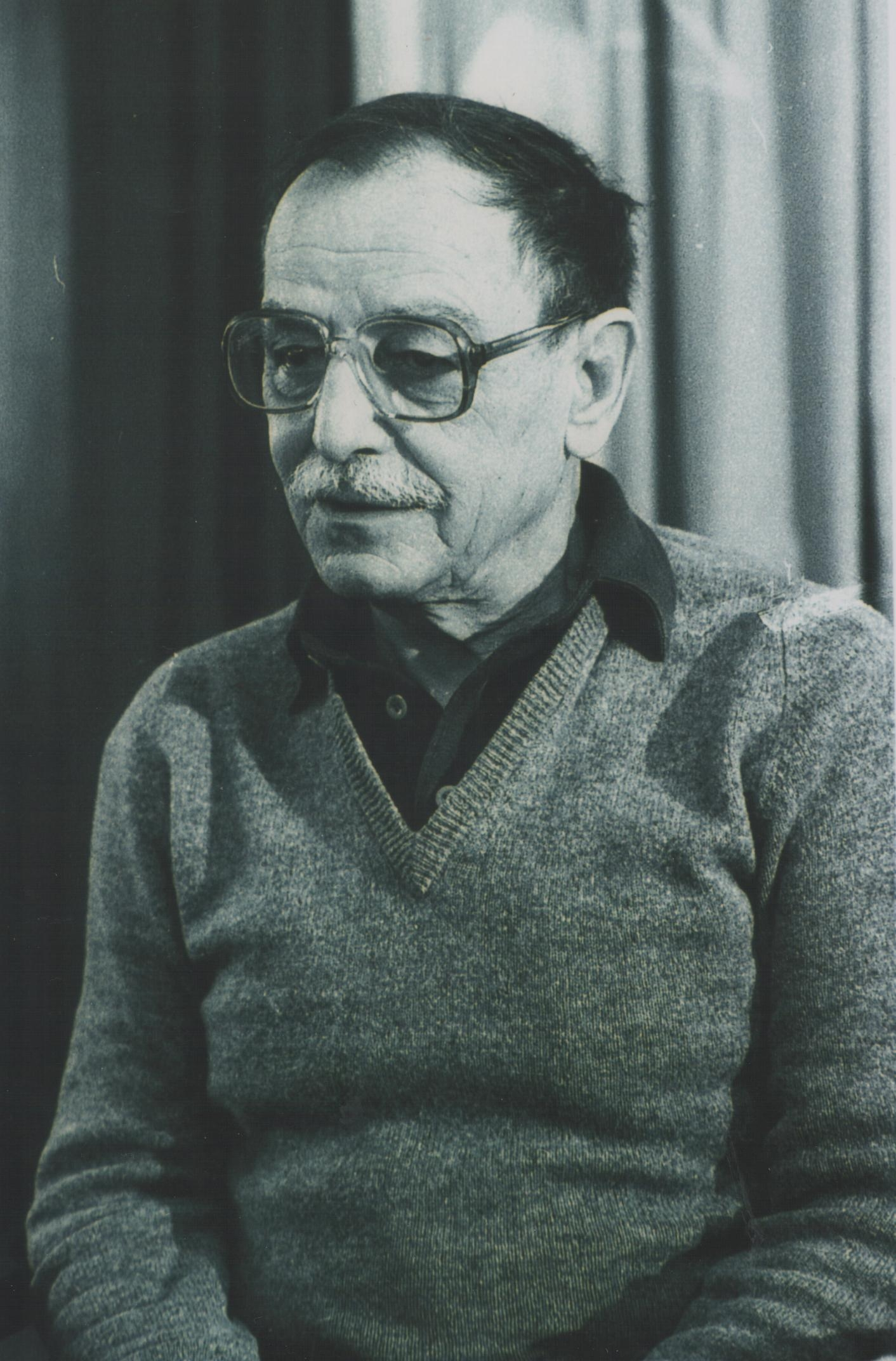 Koča Popović,foto: Stevan Kragujević (po odobrenju kćerke Tanje Kragujević)